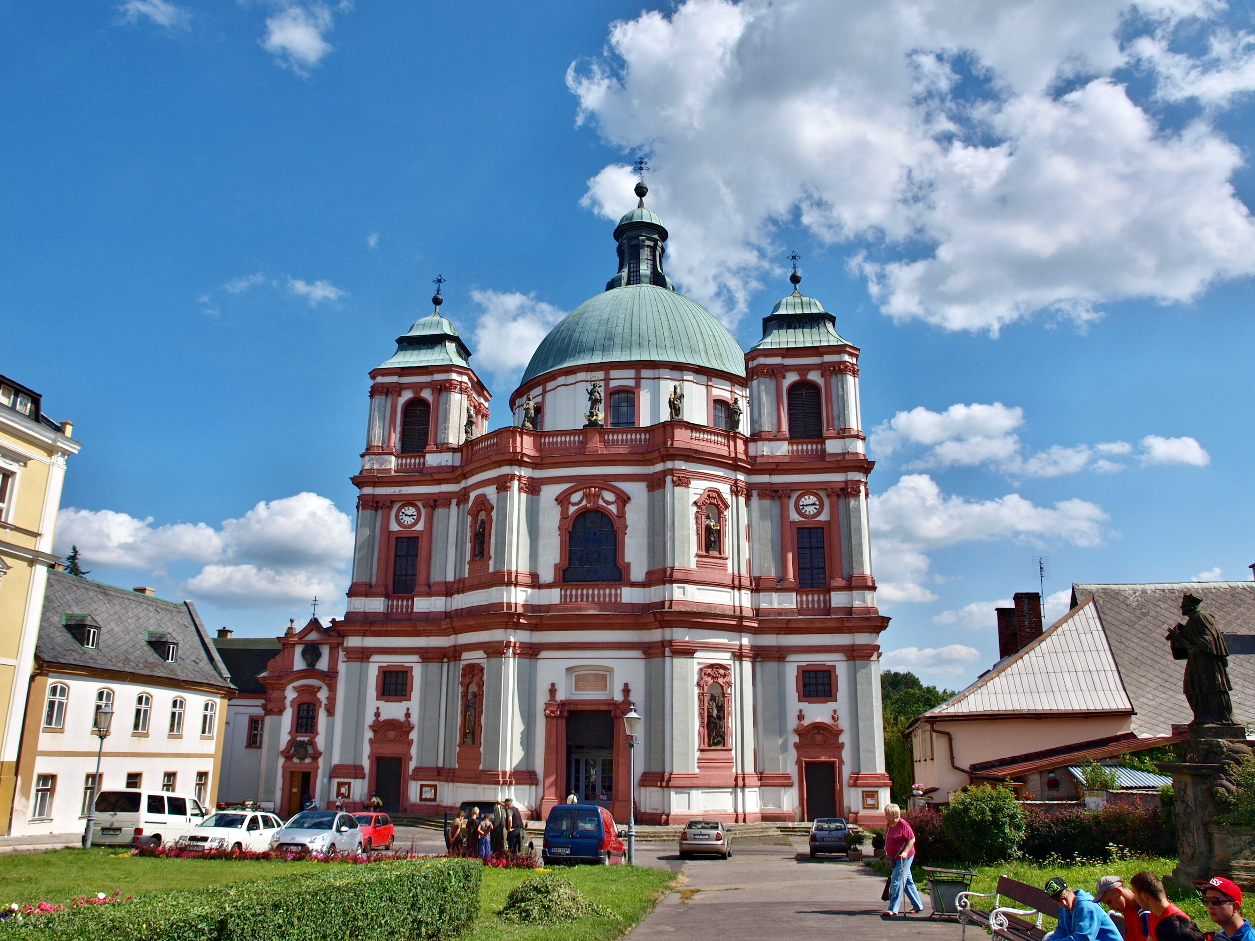 Jablonné v Podještědí - klášter (2)